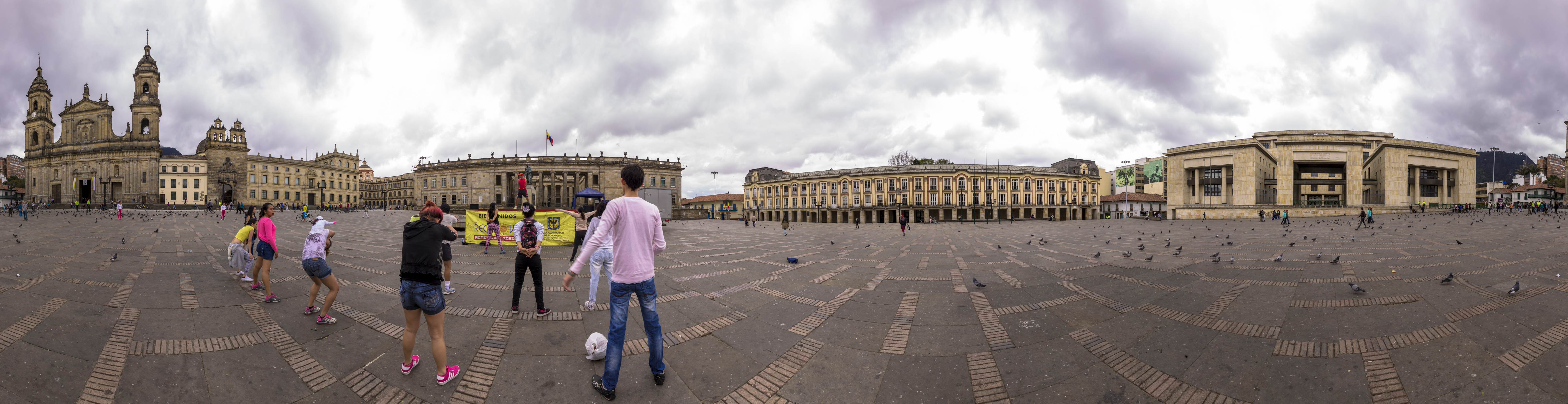 Panorámica Plaza de Bolívar Bogotá